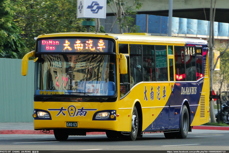 HINO - RK8JRVA - 646-U3